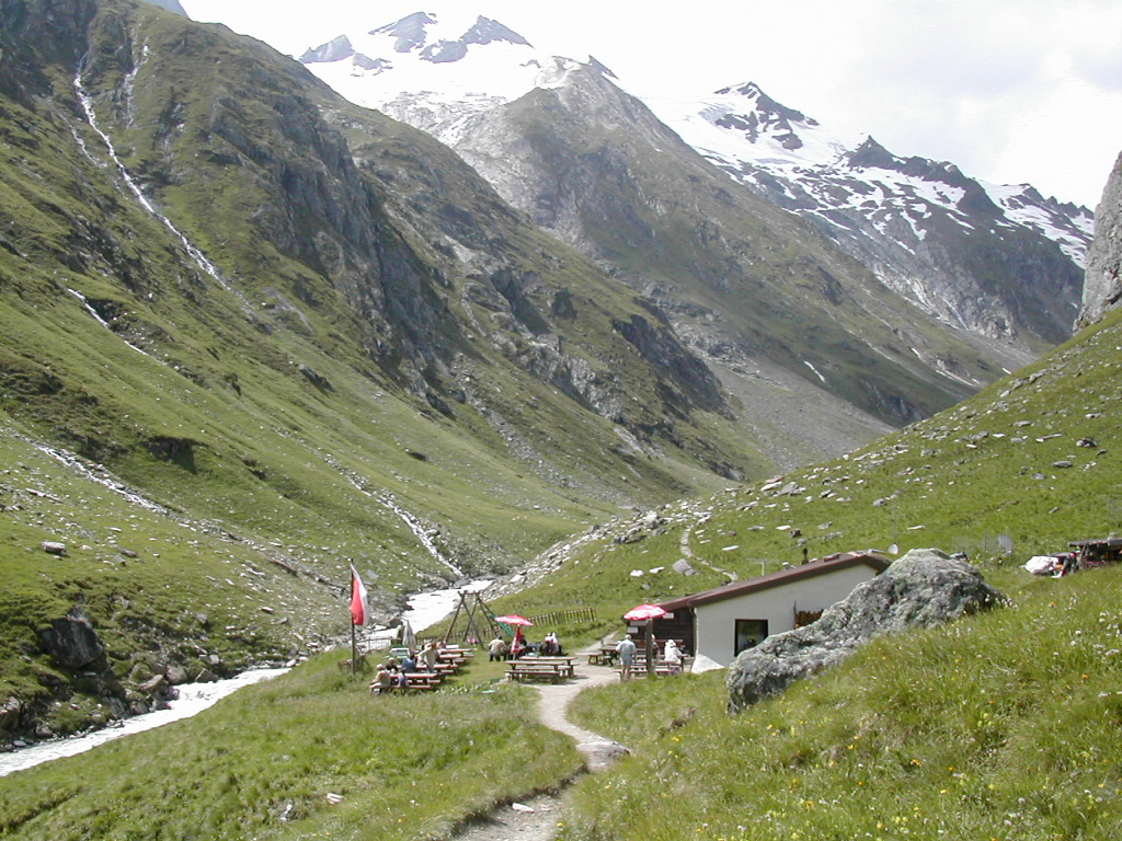 Clarahütte in Triol, Österreich.